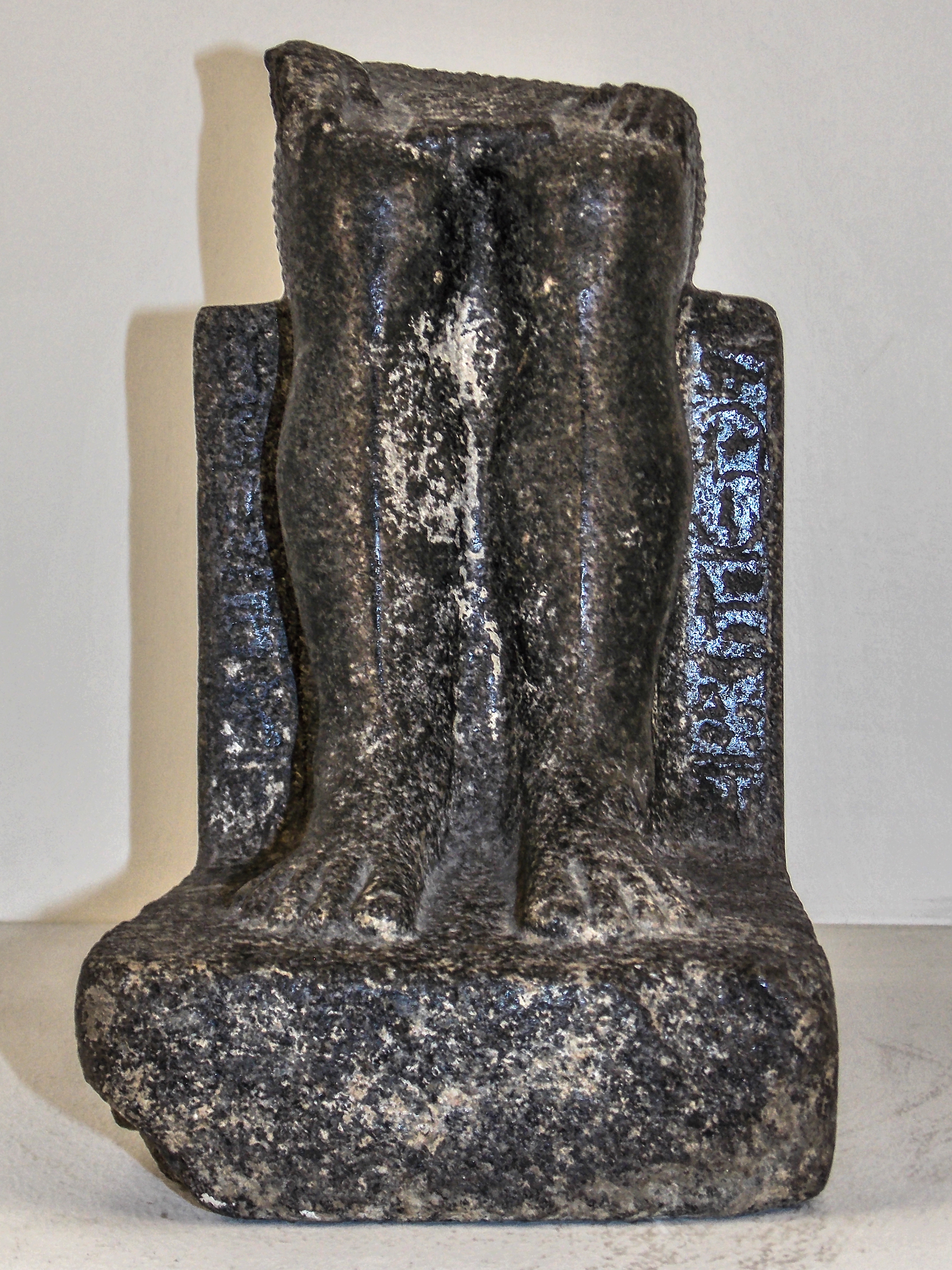 Un reperto del tempio di Iside di Benevento conservato nella sezione egizia del Museo del Sannio, presso il museo ARCOS. Gambe del faraone Merishepsesra.